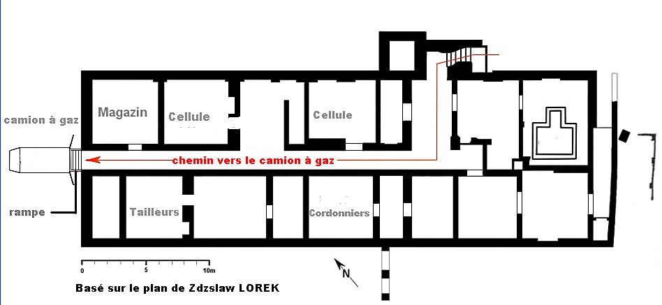 plan du sous-sol du chateau à chelmno